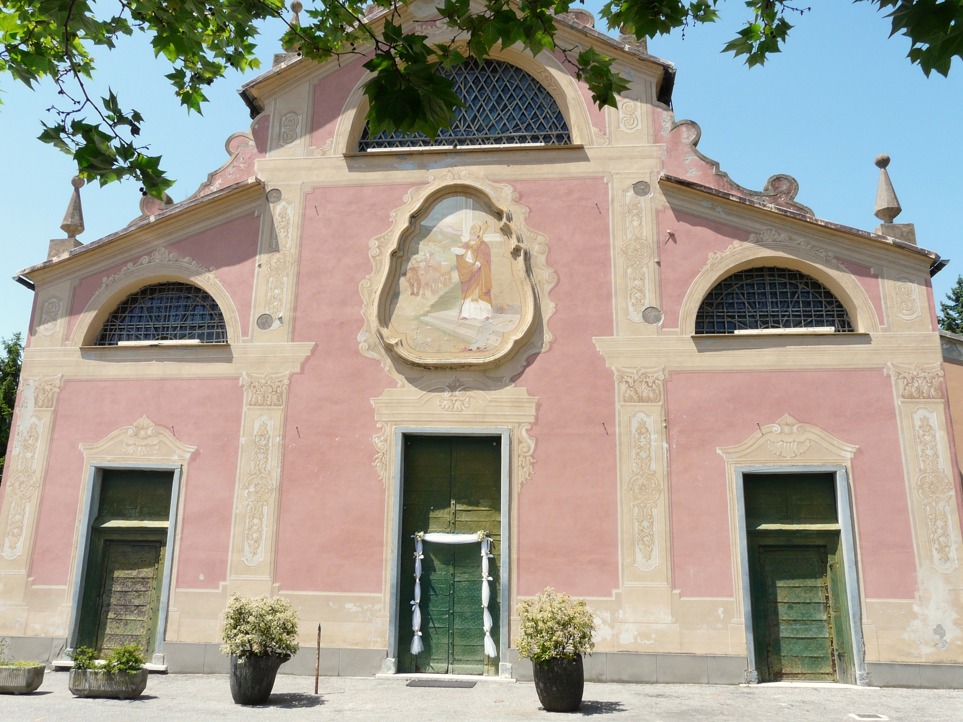 Chiesa di Sant'Olcese, Liguria, Italia